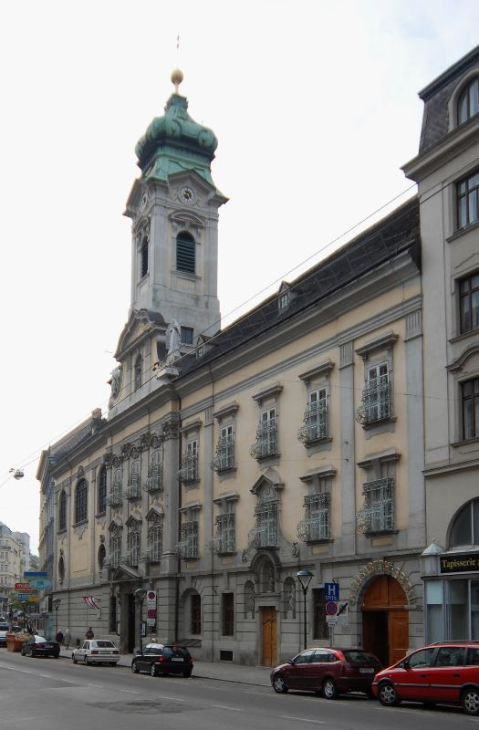 Krankenhaus Sankt Elisabeth in Wien-Landstraße (Landstraßer Hauptstraße 4a)